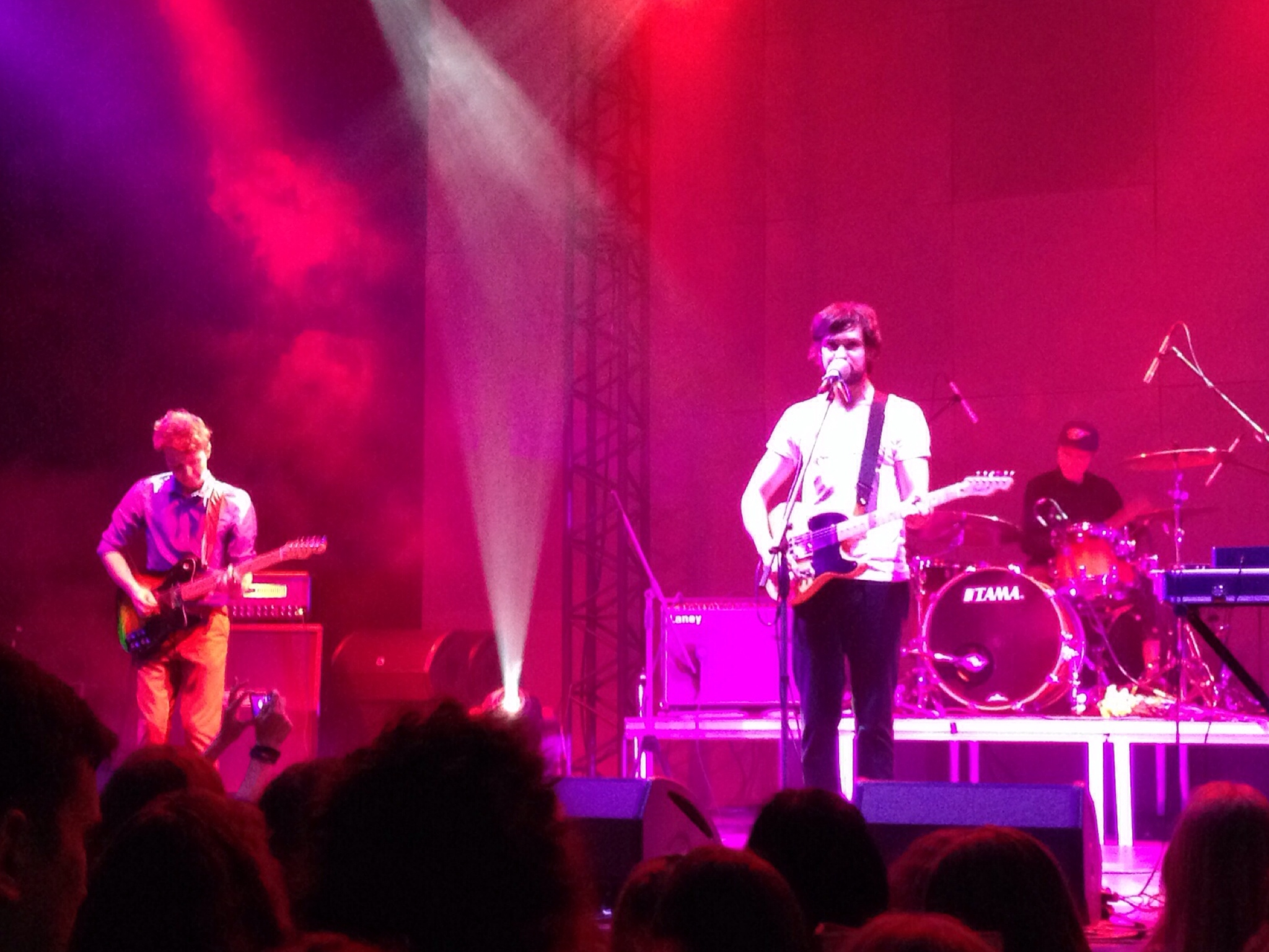 Группа Bahroma в клубе Sentrum в Киеве